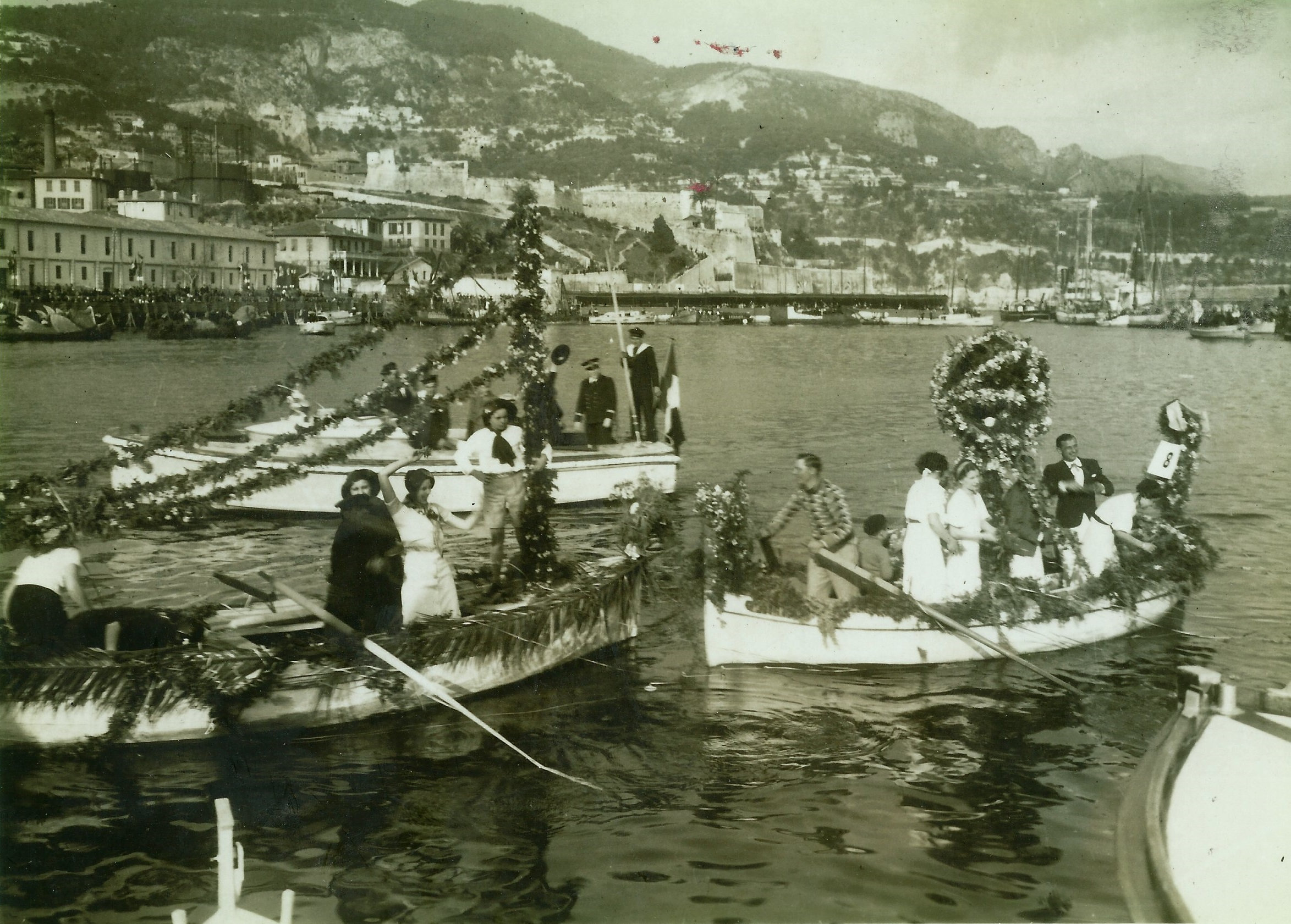 Photo d'une des premières éditions du Combat Naval Fleuri, darse de Villefranche-sur-Mer, Alpes-Maritimes, France. Date inconnue.